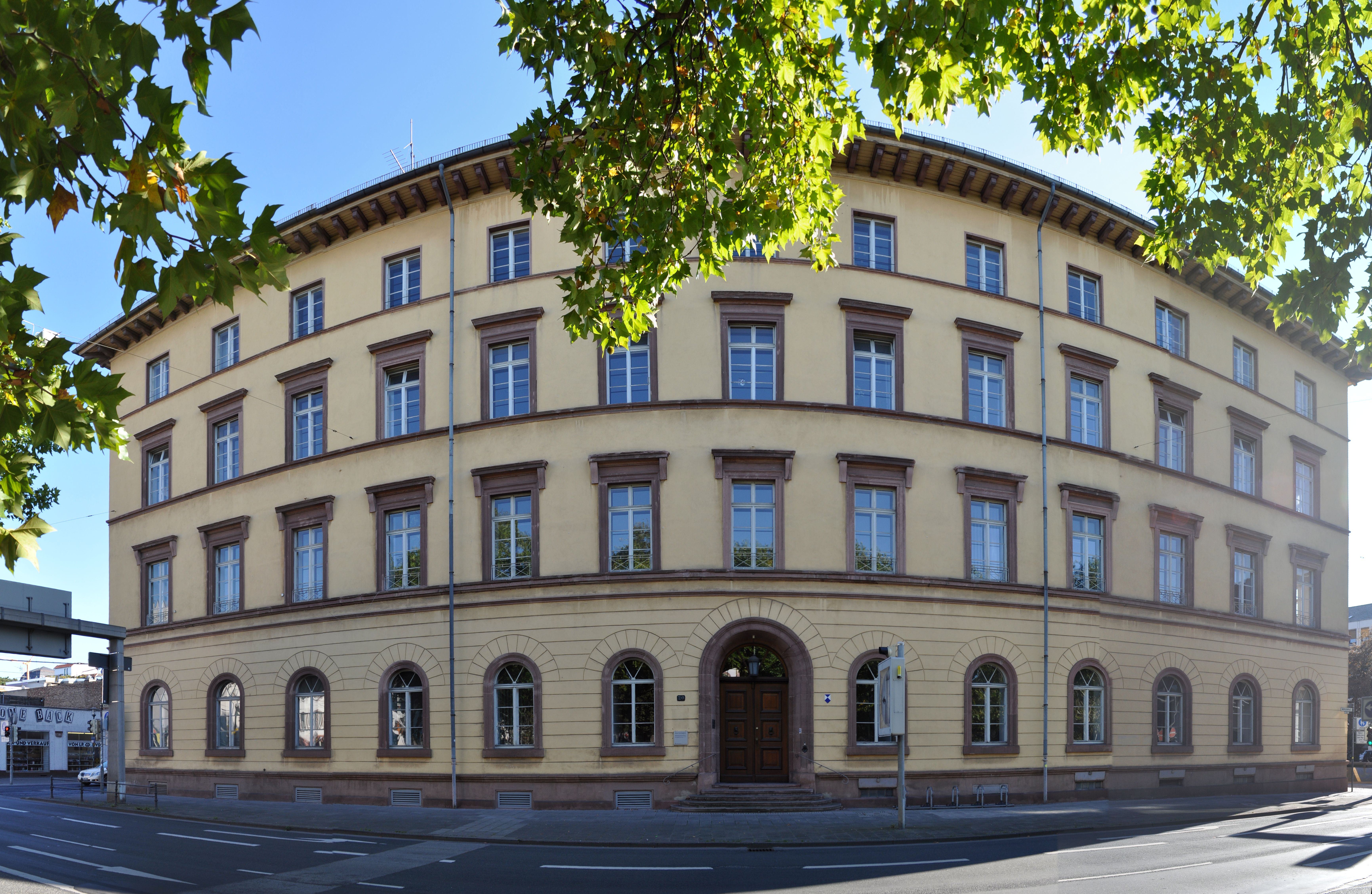 Neues Kanzleigebäude in Darmstadt. Das Gebäude ist eine Panoramaaufnahme aus 4 Einzelbildern.